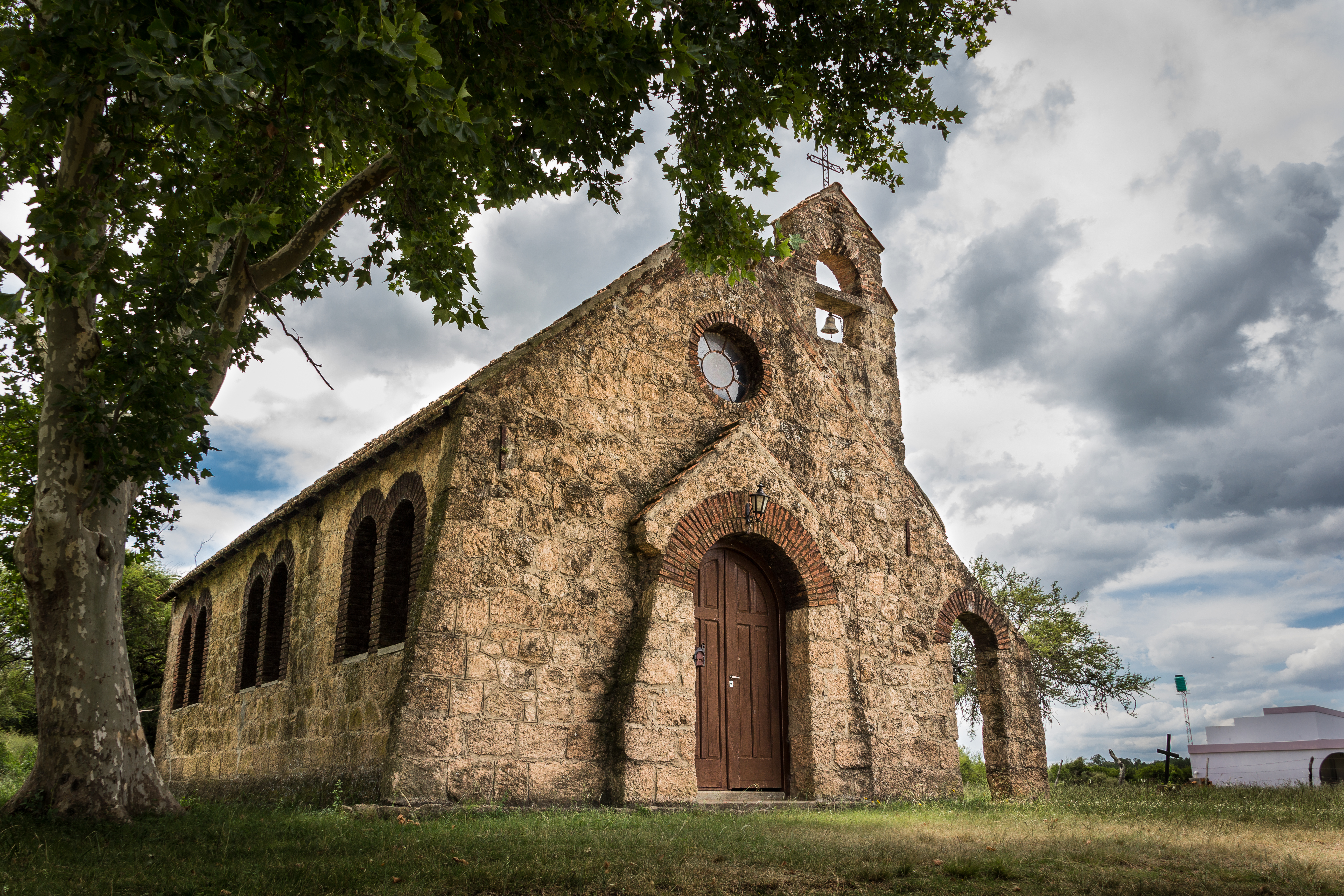 Iglesia en Colón, Entre Ríos. Argentina.